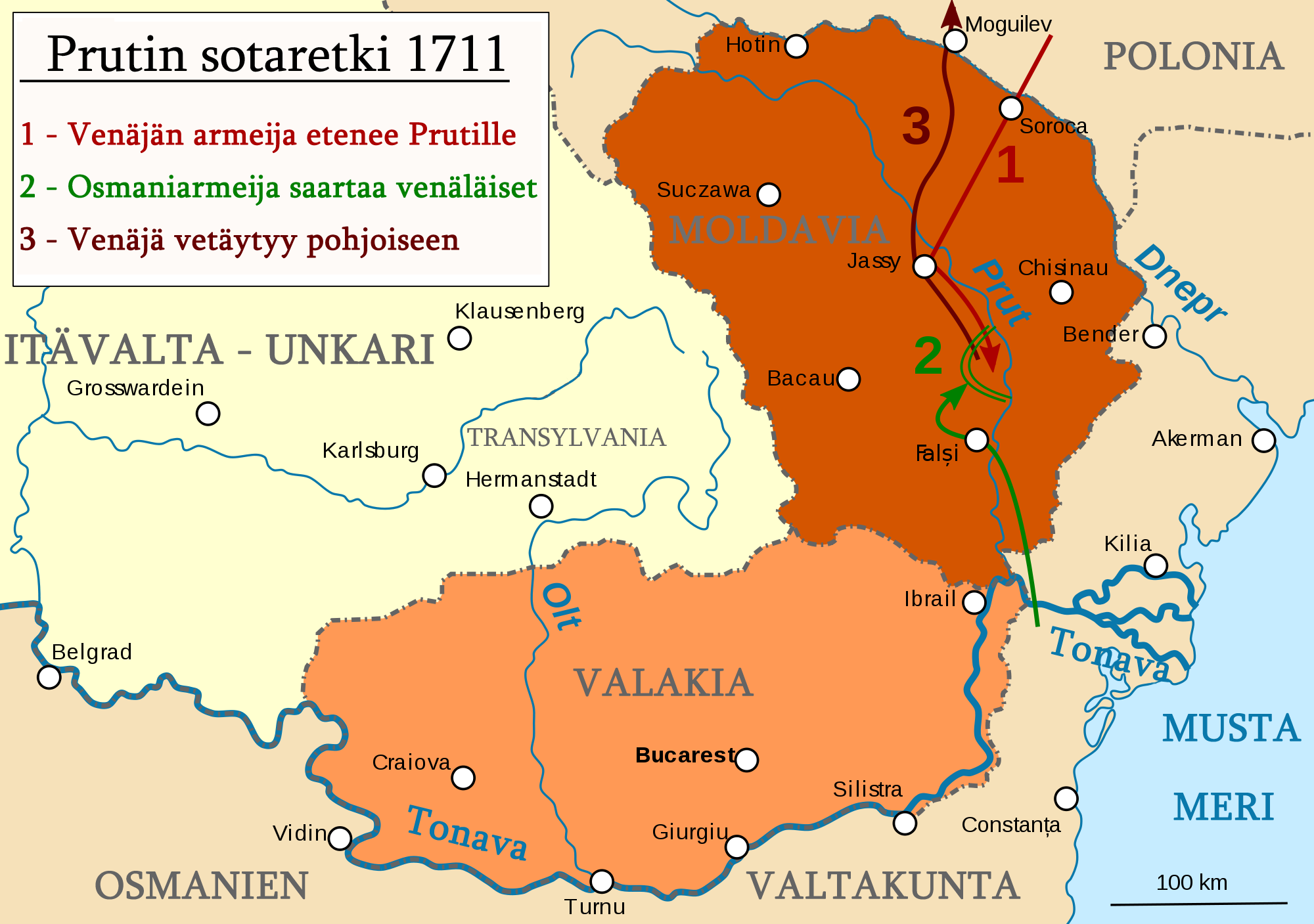 Prutin sotaretki 1711, Osmanien valtakunta vs. Venäjä